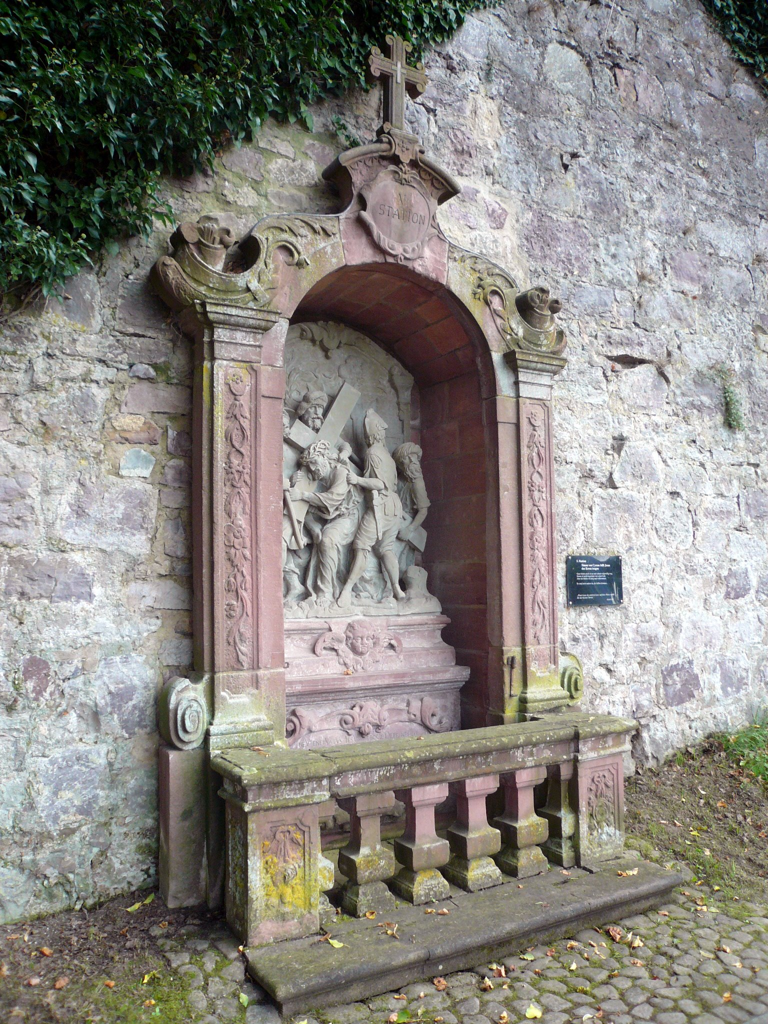 Kapellenkreuzweg Kloster Altstadt, Station 5